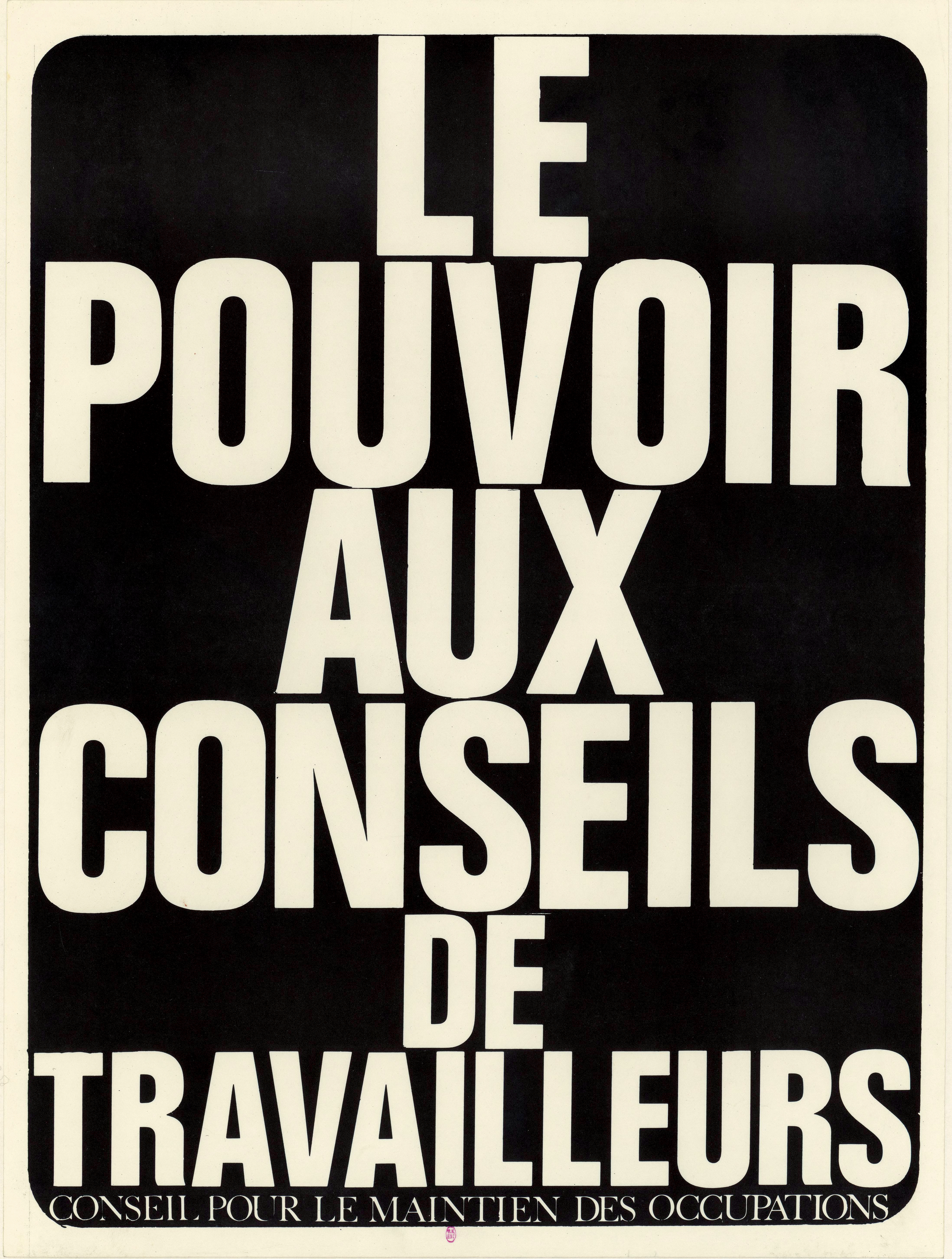 Le pouvoir aux conseils de travailleurs. Conseil pour le maintien des occupations. Affiche Mai 1968.